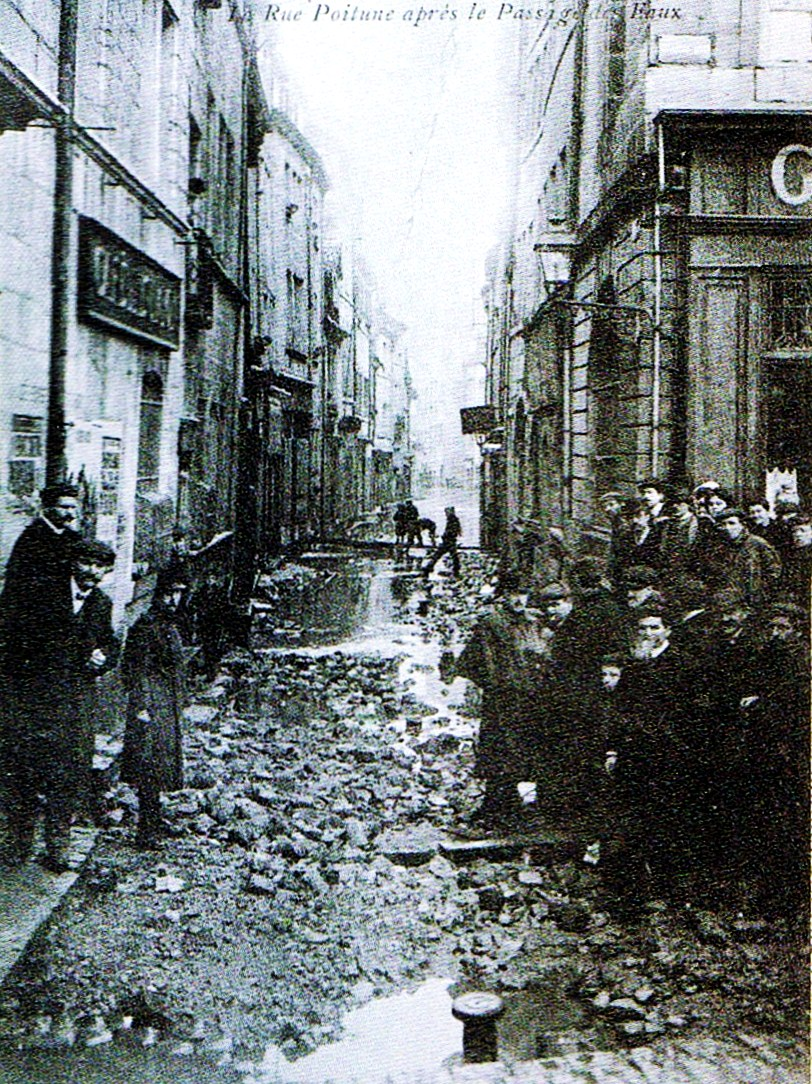 La rue Claude Pouillet de Besançon, après la décrue de l'innondation de janvier 1910.